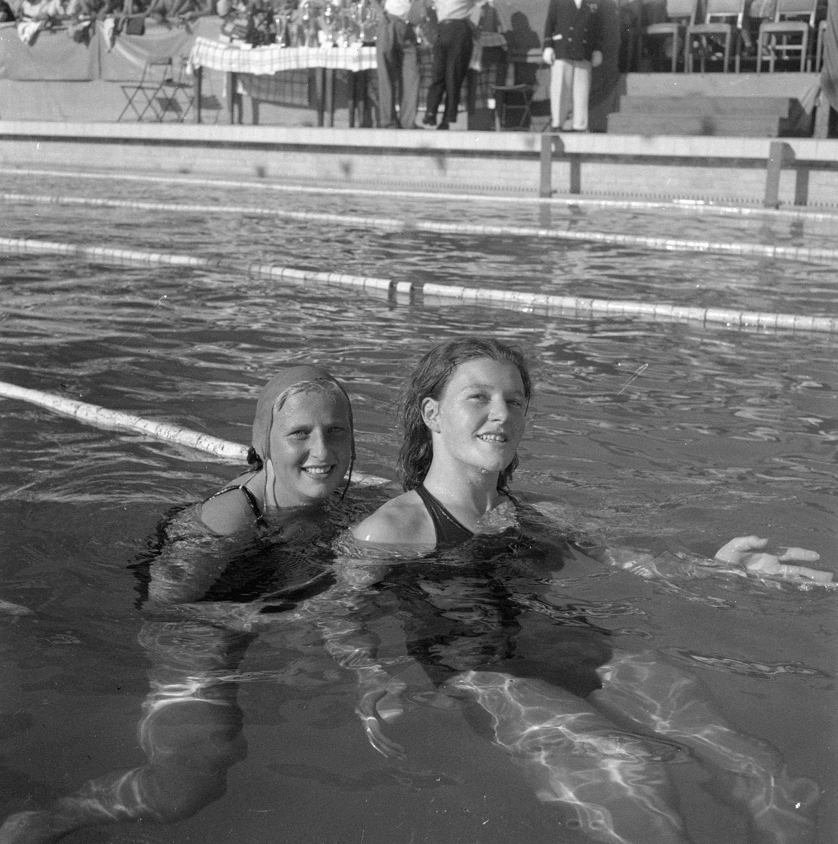 Collectie / Archief : Fotocollectie Anefo Reportage / Serie : Europese zwemkampioenschappen te Monaco Beschrijving : Nel van Vliet (voor) eerste en Janny de Groot derde bij de 200 meter schoolslag Datum : 14 september 1947 Locatie : Monaco Trefwoorden : schoolslag, winnaars, zwemmen, zwemmen Persoonsnaam : Groot, Janny de, Vliet, Nel van Fotograaf : Noske, J.D. / Anefo Auteursrechthebbende : Nationaal Archief Materiaalsoort : Negatief (zwart/wit) Nummer archiefinventaris : bekijk toegang 2.24.01.03 Bestanddeelnummer : 902-3550